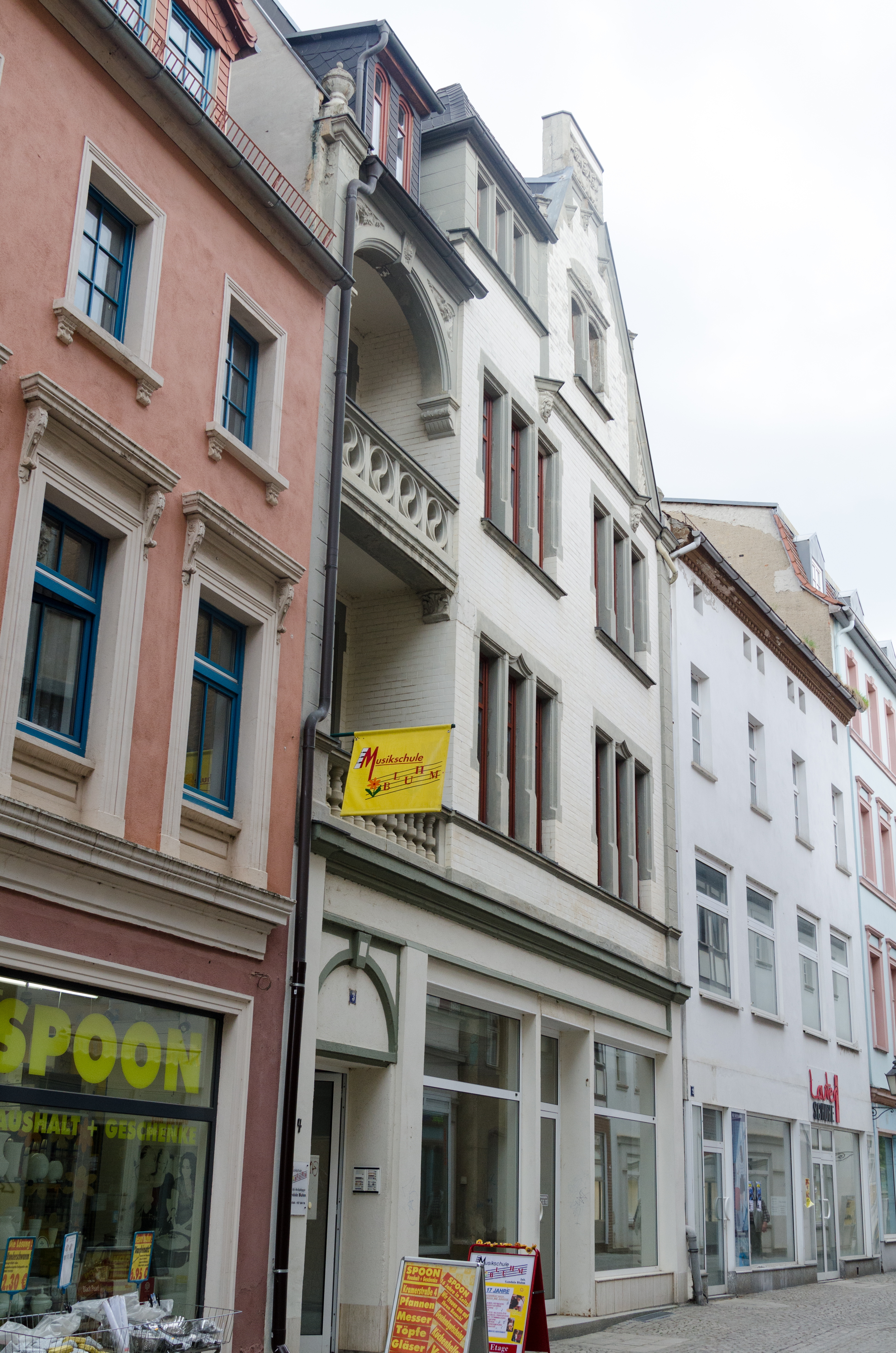 Zeitz, Kramerstraße 3